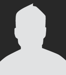 Profil licnosti